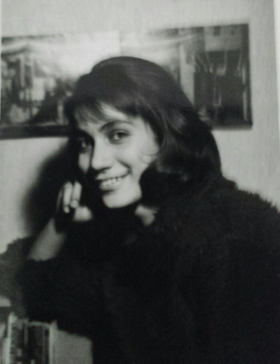 Nydia Quiroga en el año 1961